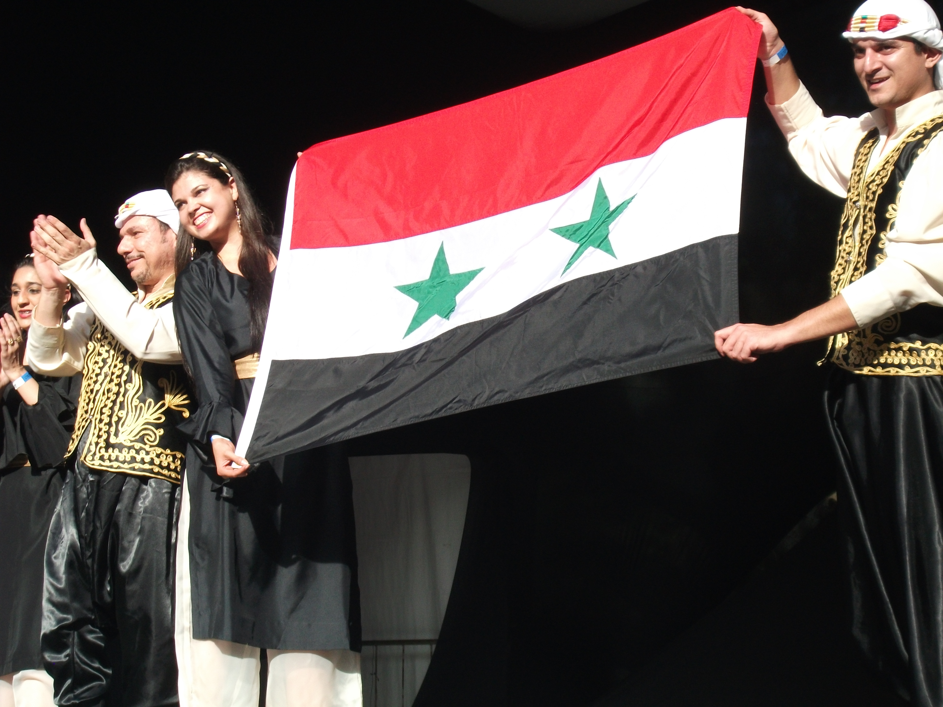 Grupo folclórico de dança síria da cidade de São Paulo